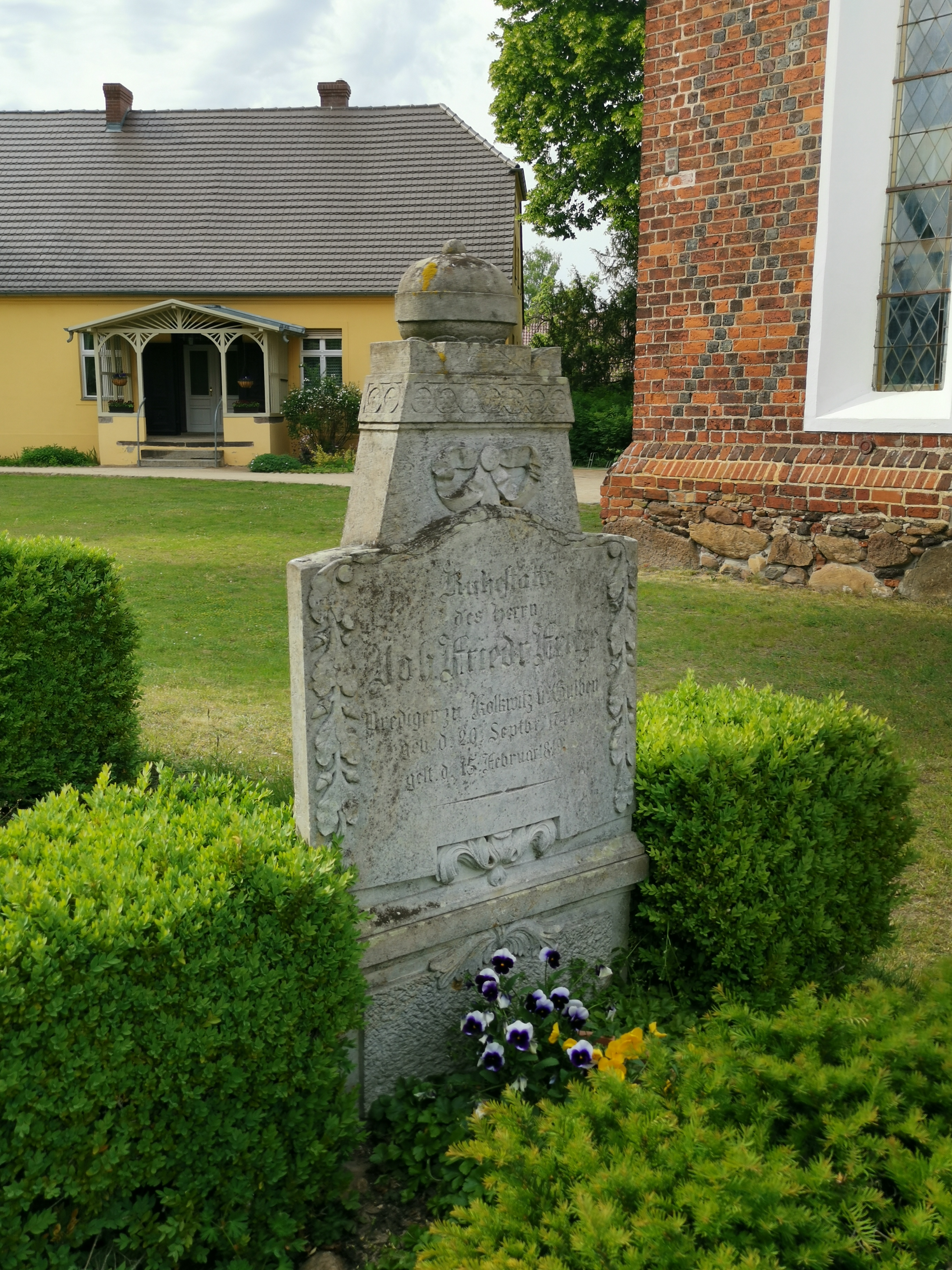 Grabstein von Jan Bjedrich Fryco auf dem Kirchhof Kolkwitz Dolnoserbski: Kamjeń na row Jana Bjedricha Fryca na gołkojskem kjarchobje Hornjoserbsce: Narowny kamjeń Jana Bjedricha Fryca na Gołkojčanskim kěrchowje